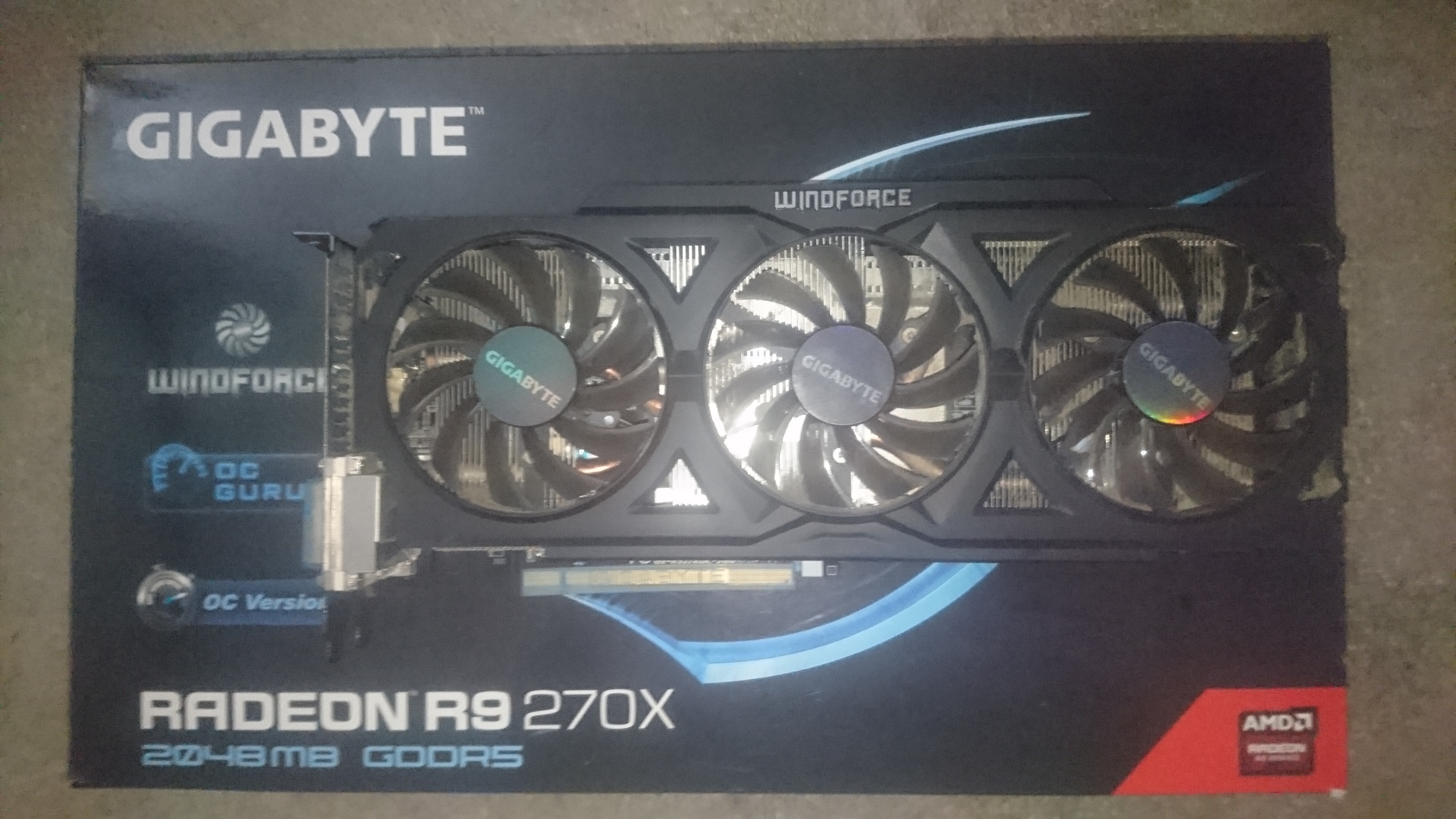 Gigabyte Radeon R9 270X 2GB